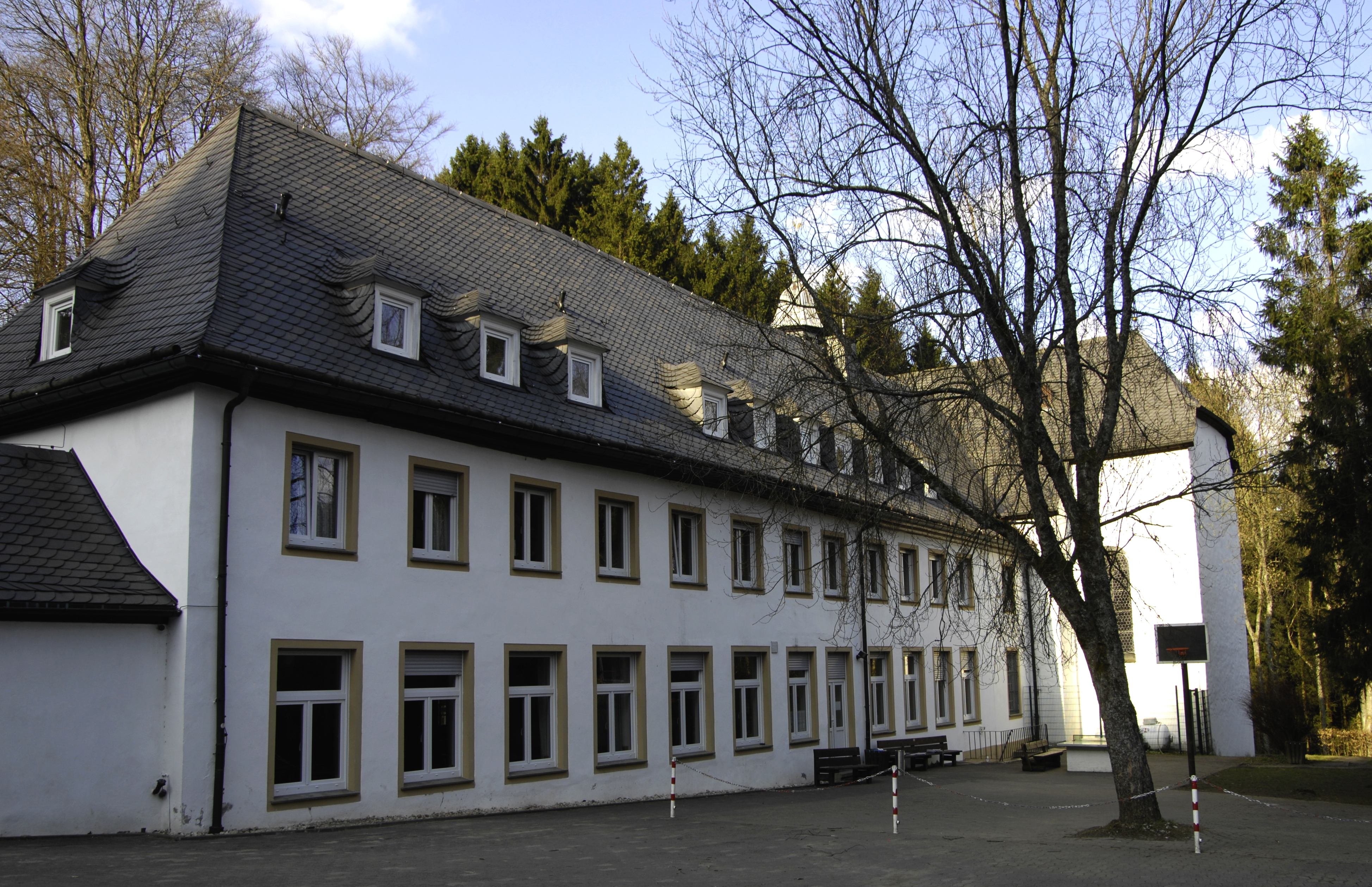 Kloster Brunnen, Sauerland